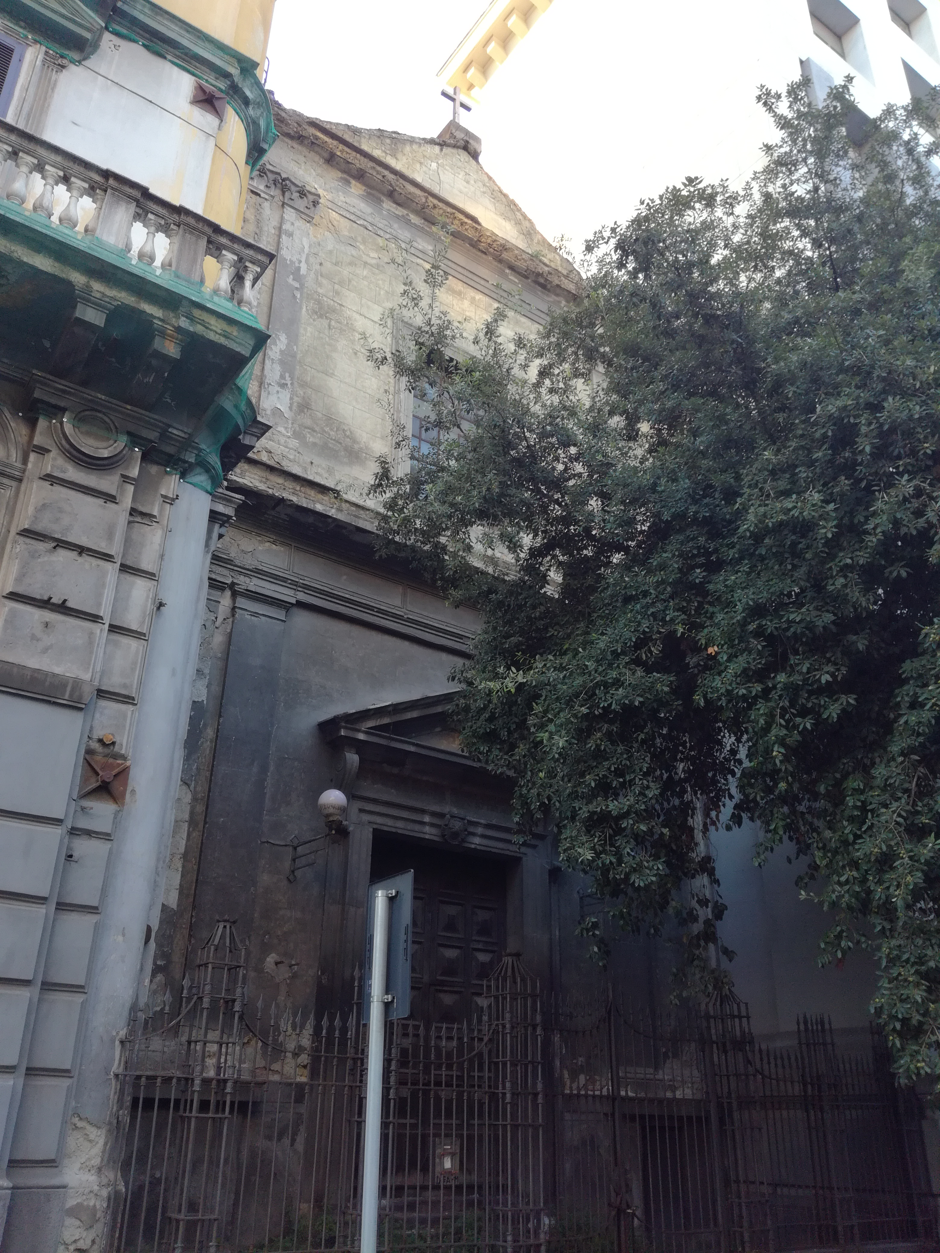 Esterno di San Giacomo degli Italiani (Napoli)